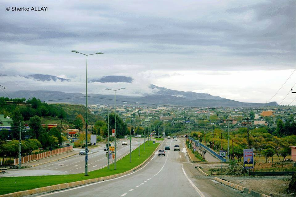 کوردیی ناوەندی: وێنەی قەڵادزێ